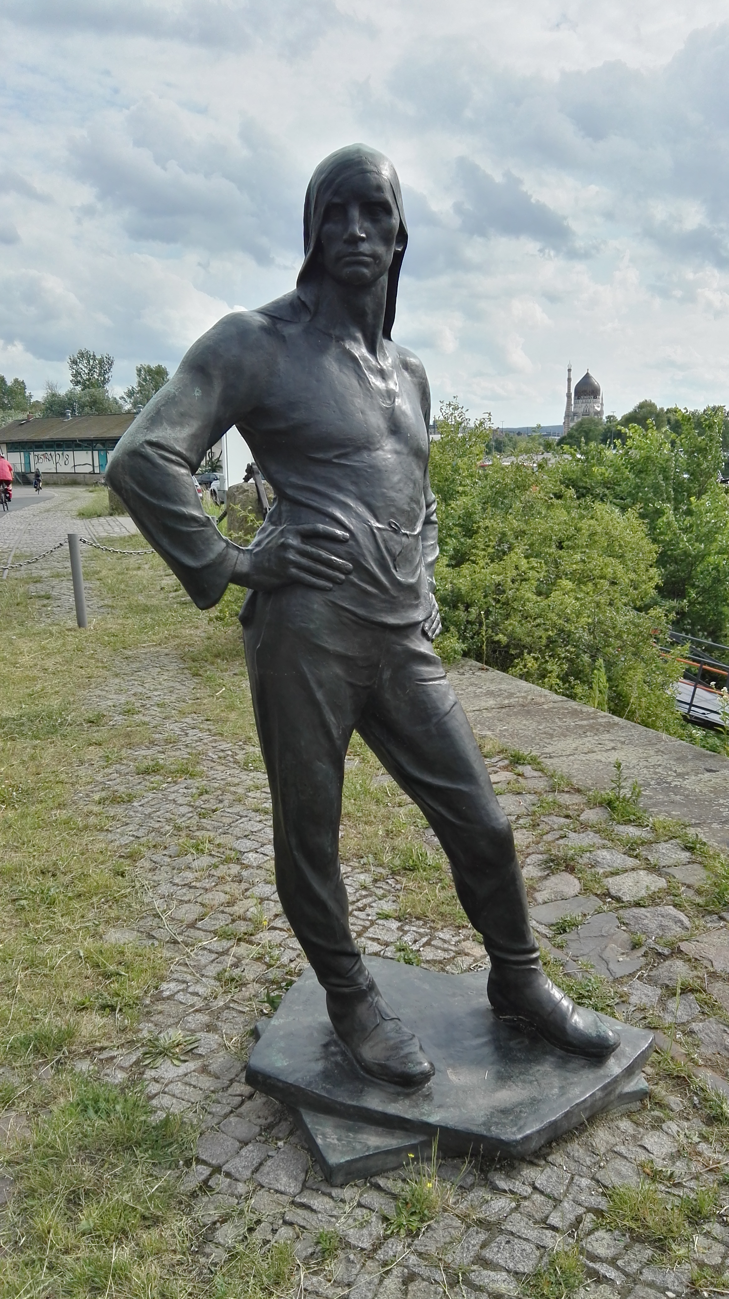 Plastik "Der Lastenträger" von Constantin Meunier aufgestellt im Neustädter Hafen in Dresden